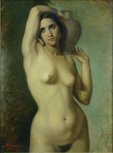 Gheorghe Tattarescu - Nud (1850), ulei pe hârtie lipită pe pânza, Muzeul Naţional de Artă al României, Bucureşti